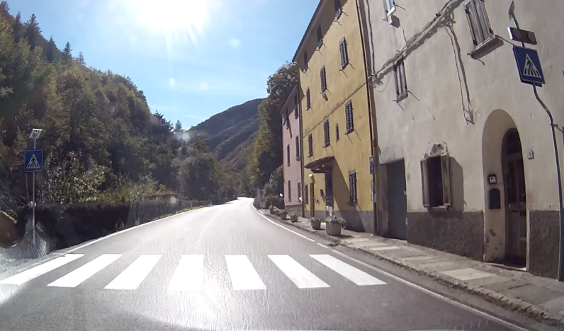 Sambuca Pistoiese, frazione San Pellegrino al Cassero